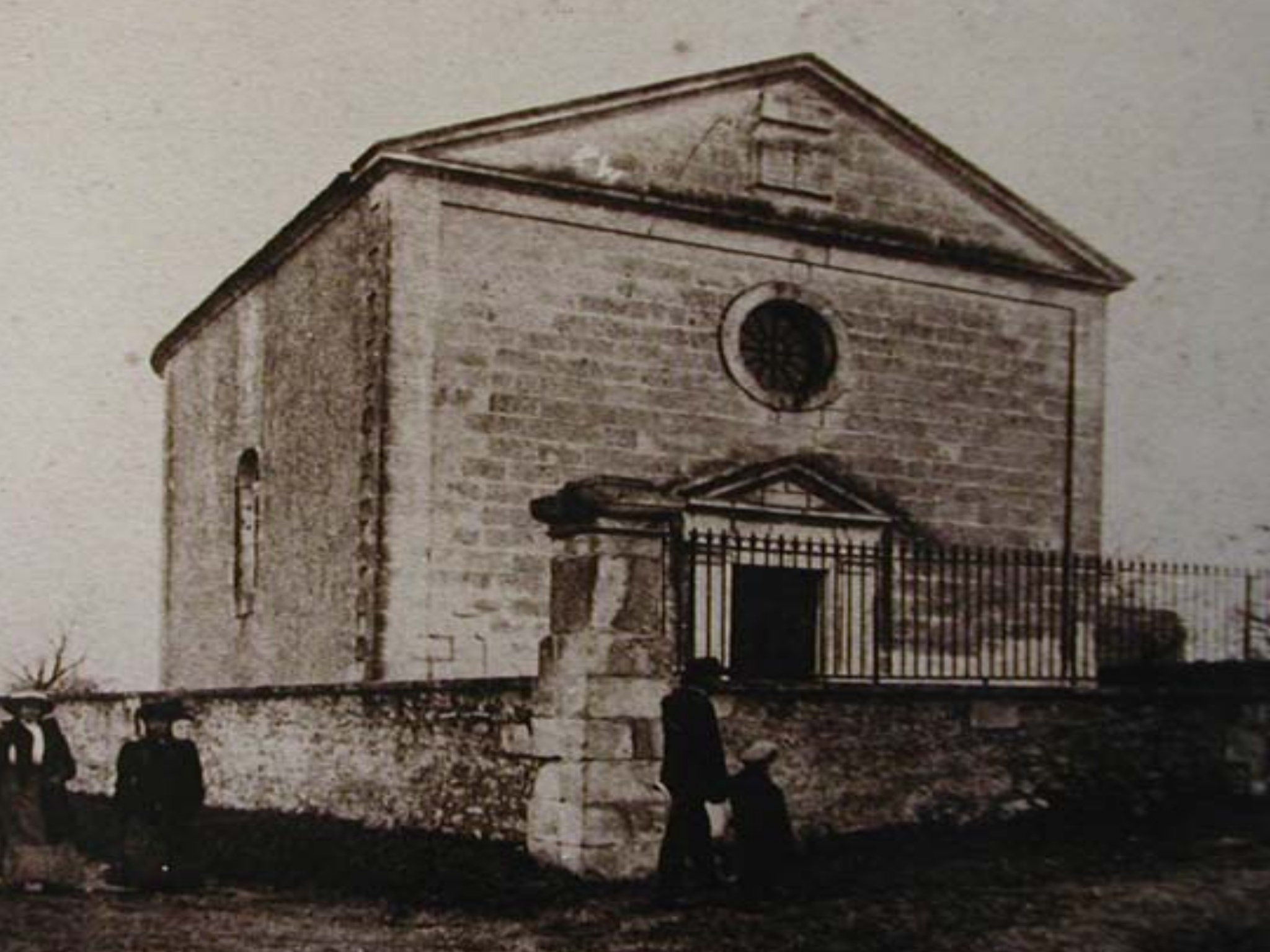 Le temple du Billeau à Breuillet (démoli depuis)